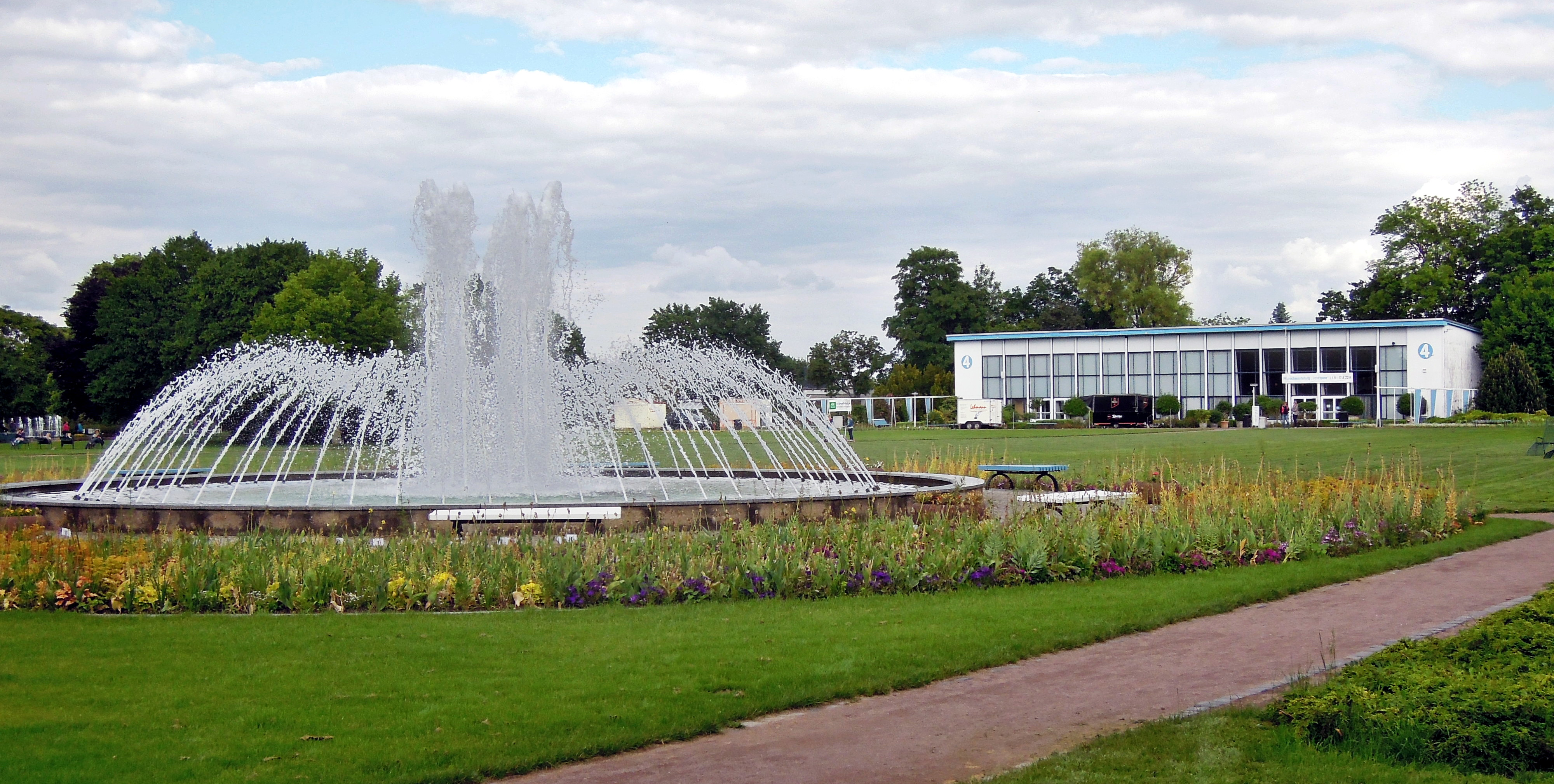 Springbrunnen und Ausstellungshalle im Egapark in Erfurt